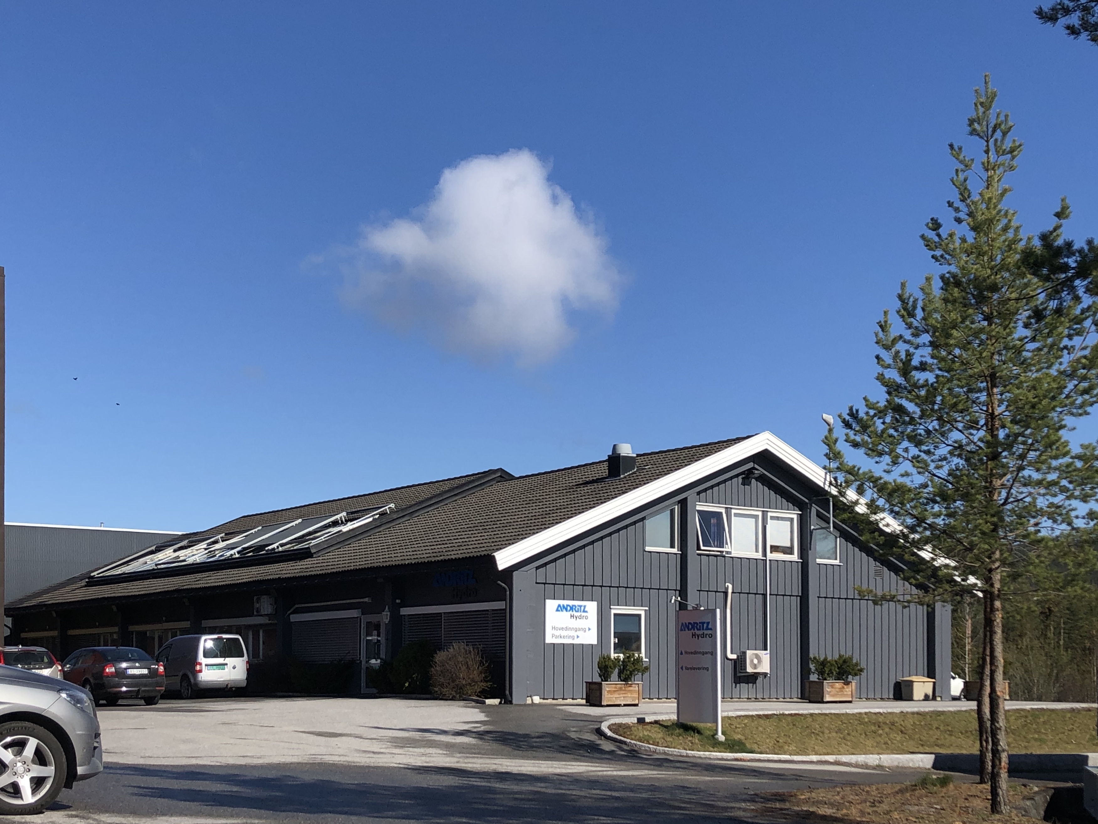 Energiveien 9, Jevnaker